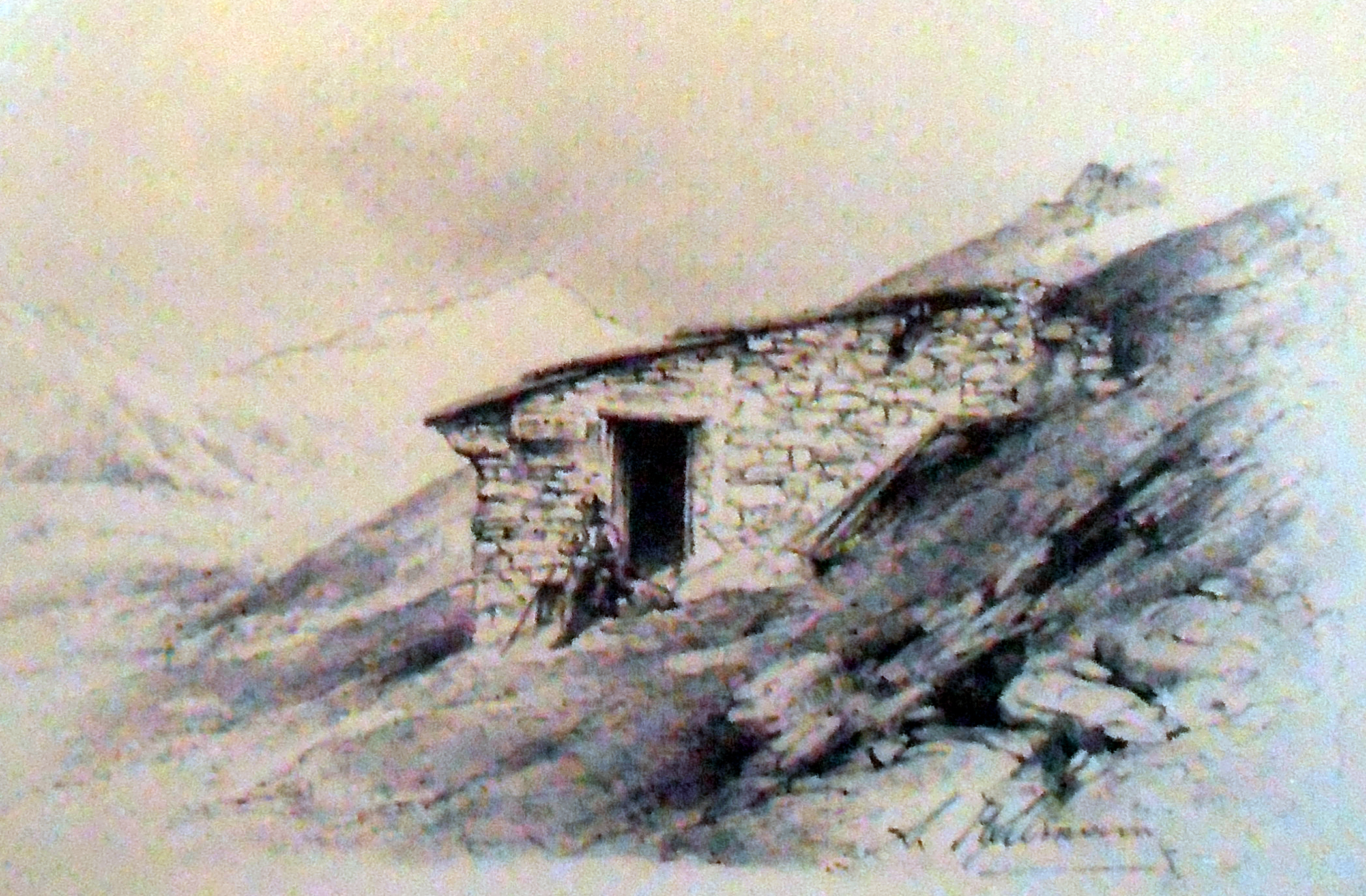 Hofmannshütte, etwa 1880. Aquarell